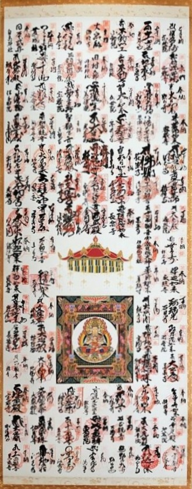 新四国曼荼羅霊場の掛け軸